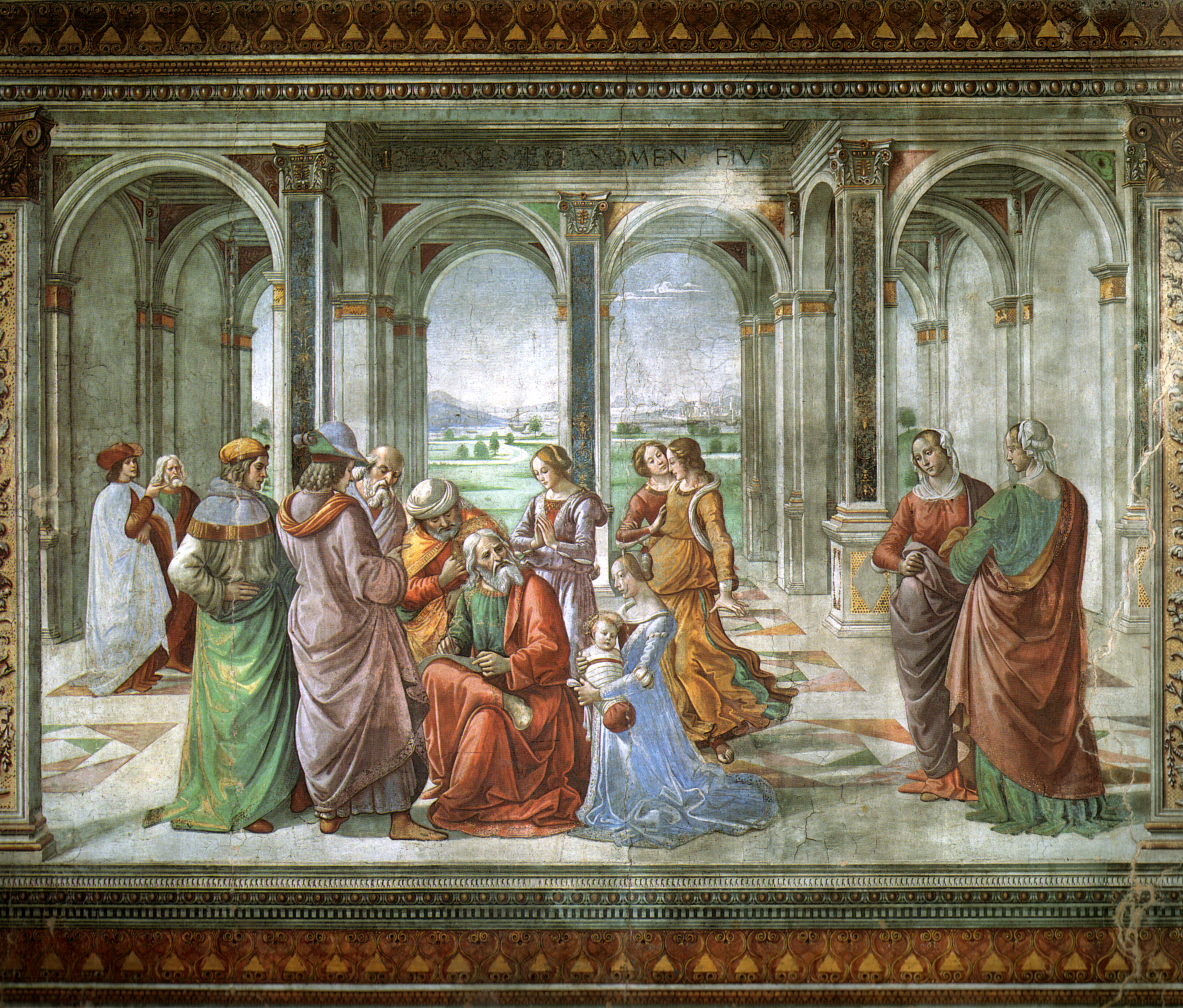 cappella tornabuoni frescoes in florence